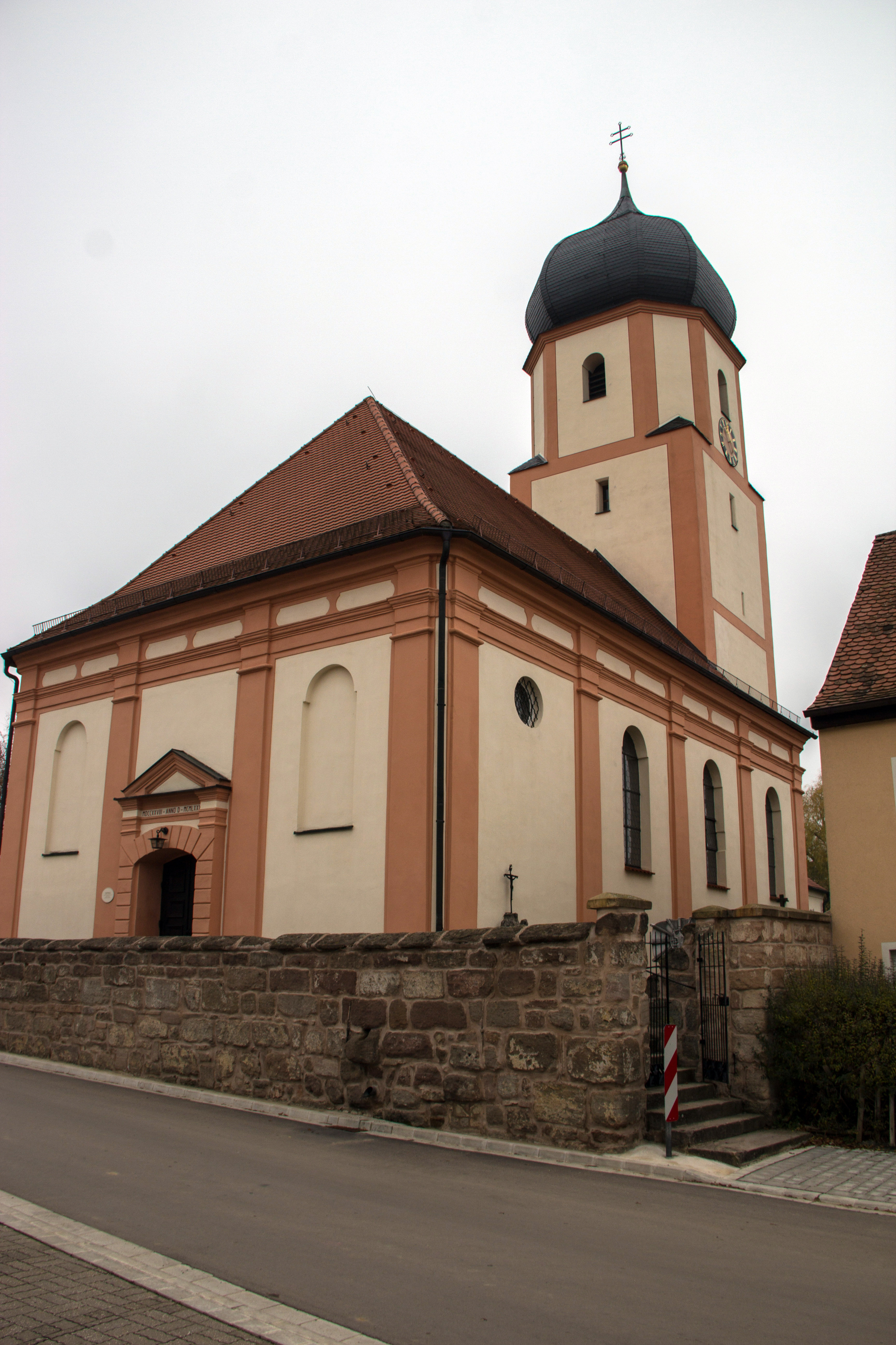 Katholische Pfarrkirche Mariae Geburt in Jahrsdorf